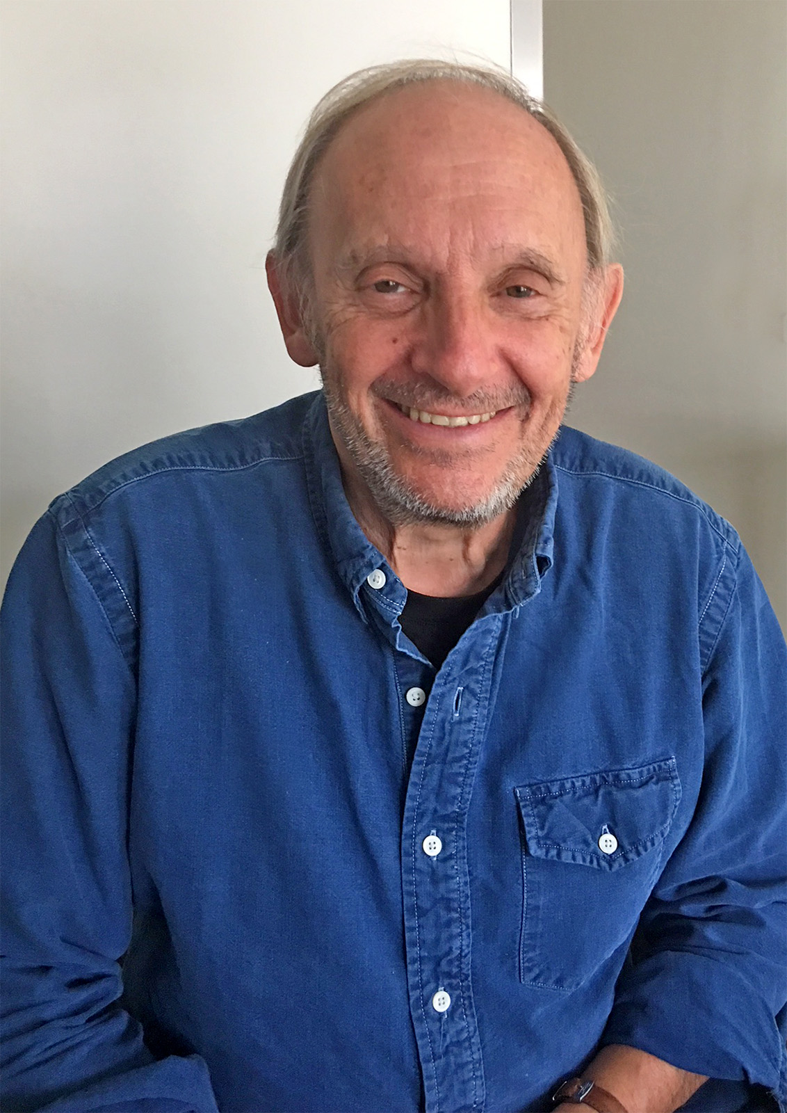 Jean-Marie Pontaut